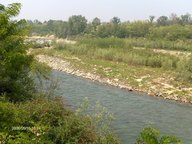 Stura di Lanzo, fotografia originale scattata in zona compresa tra i comuni di Nole e Cirie'. Autore: Tapion